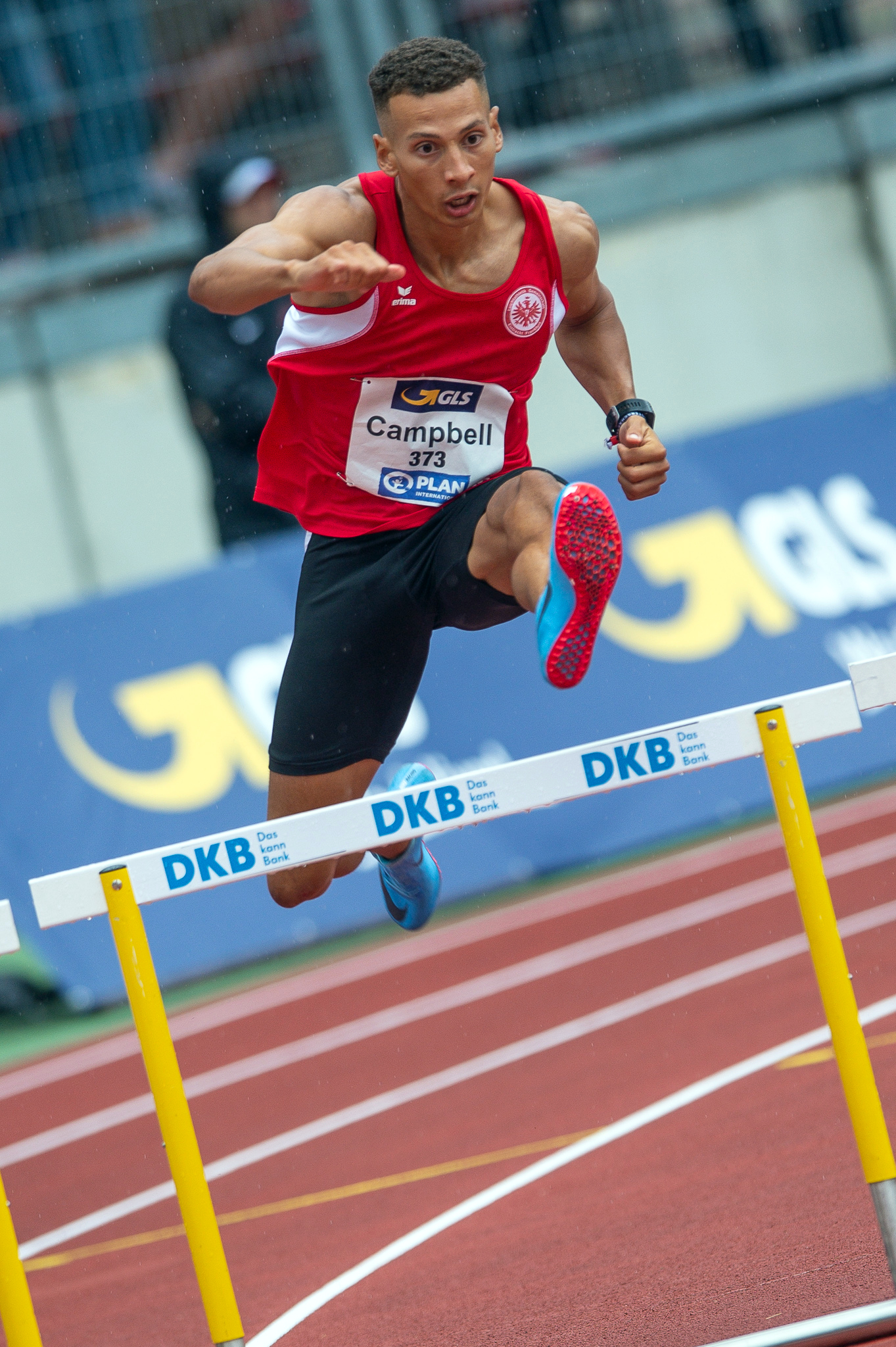 400 metres hurdles,400-Meter-Hürdenlauf,DLV,Deutsche Leichtathletik Meisterschaften 2018,Deutscher Leichtathletik-Verband,LG Eintracht Frankfurt,Luke Campbell,Max-Morlock-Stadion